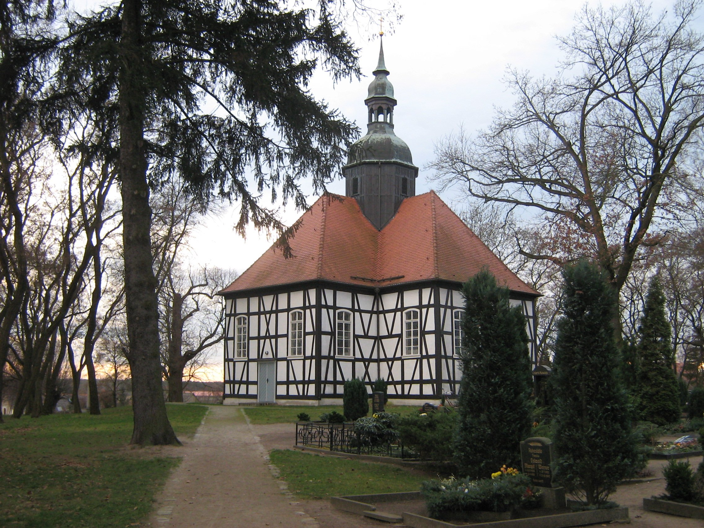 Kirche in Krausnick (Gemeinde Krausnick-Groß Wasserburg, Landkreis Dahme-Spreewald, Brandenburg)